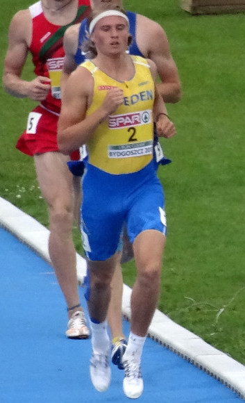 Młodzieżowe Mistrzostwa Europy w Lekkoatletyce U23 w Bydgoszczy 2017; dziesięciobój mężczyzn, bieg na 1500 m finał